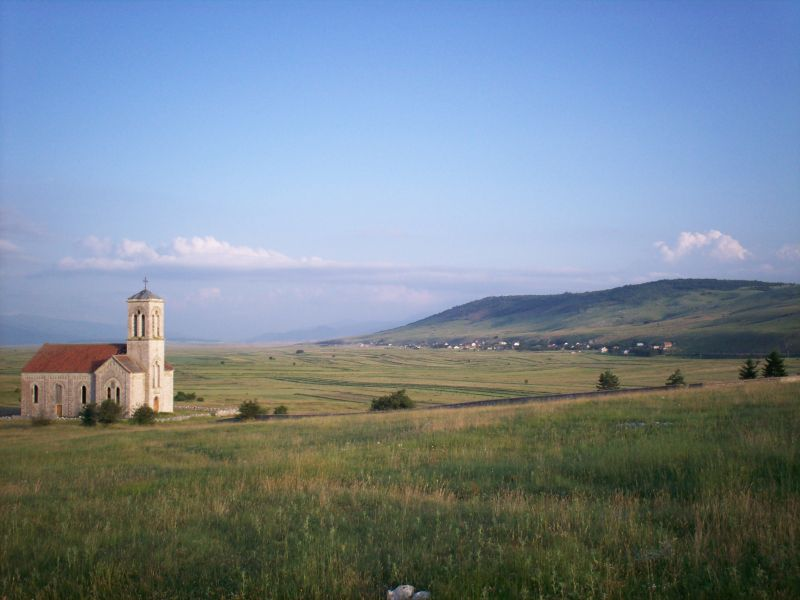 Selo Šumnjaci u opštini Glamoč, Bosna i Hercegovina